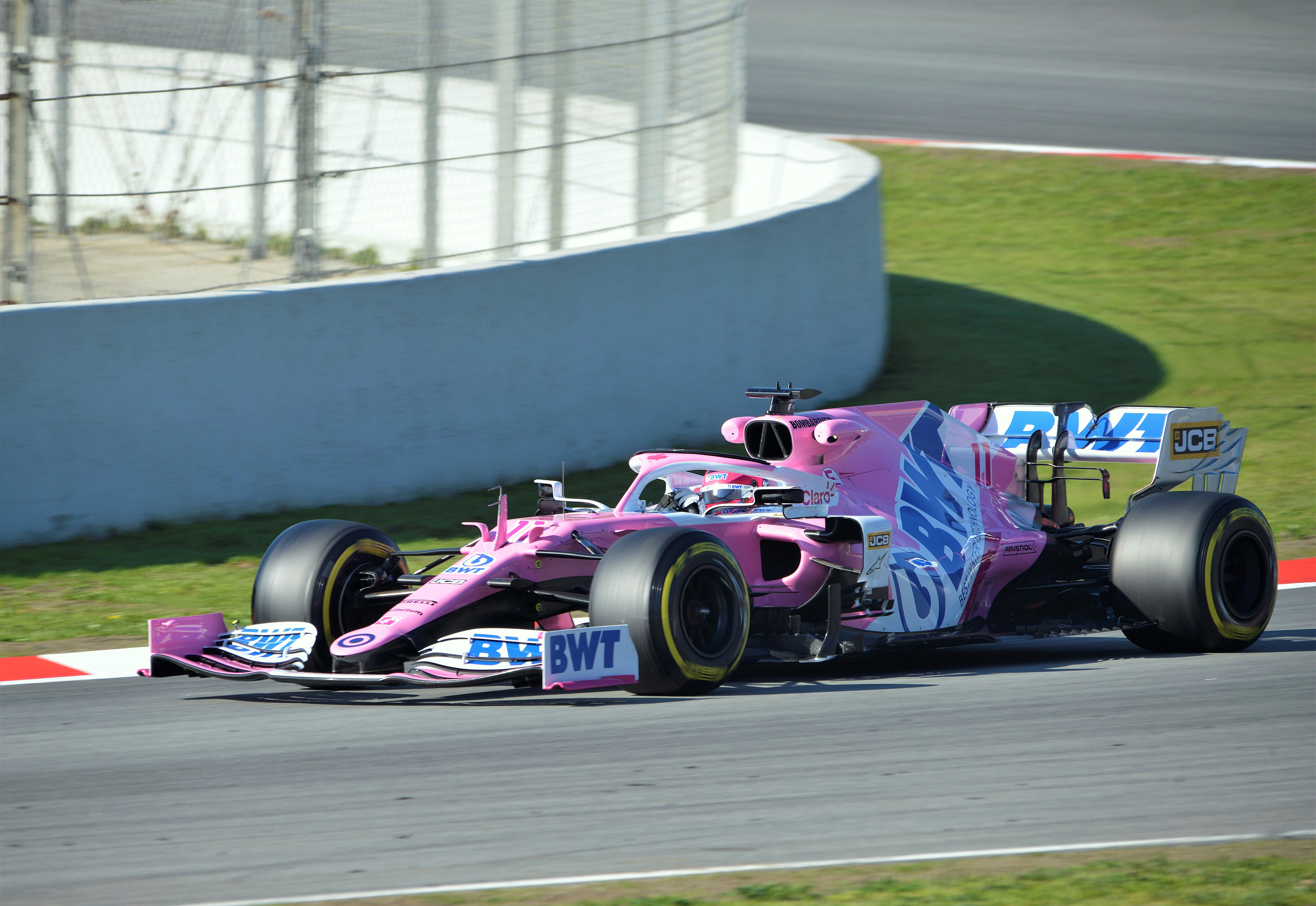 Test Days F1 2020